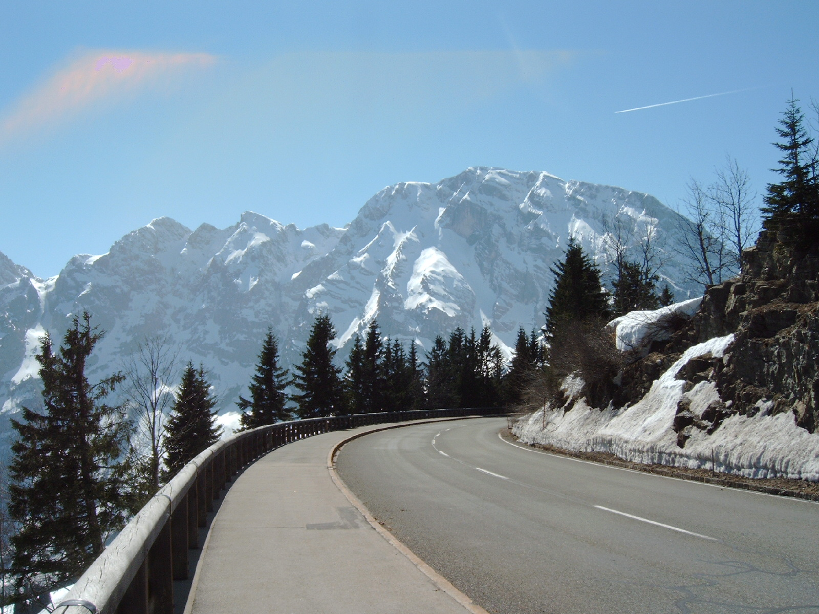 Rossfeld mit Blick auf Hoher Göll in Berchtesgaden.